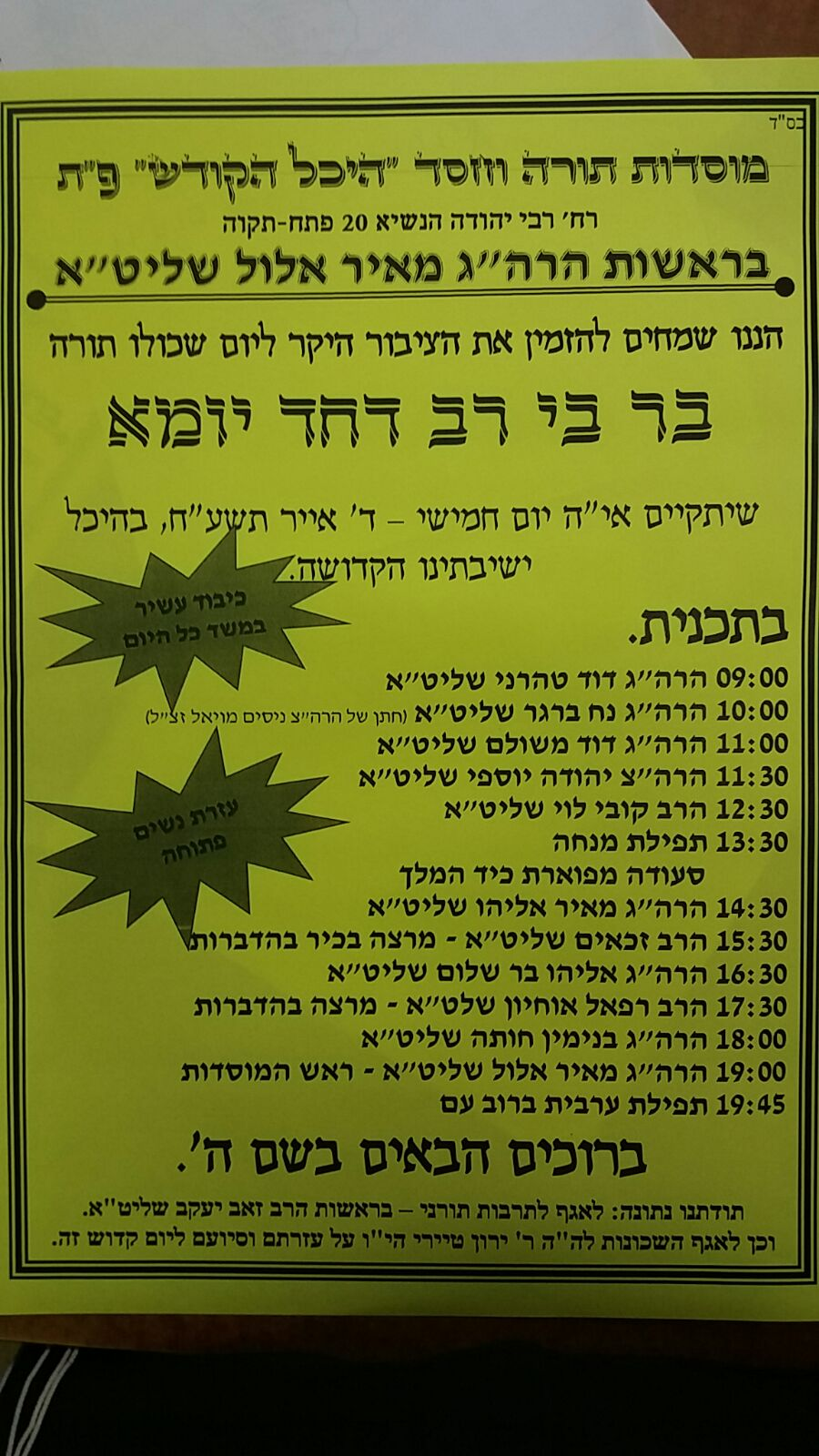 שלט על יום שכולו תורה בפתח תקווה יום העצמאות תשע"ח